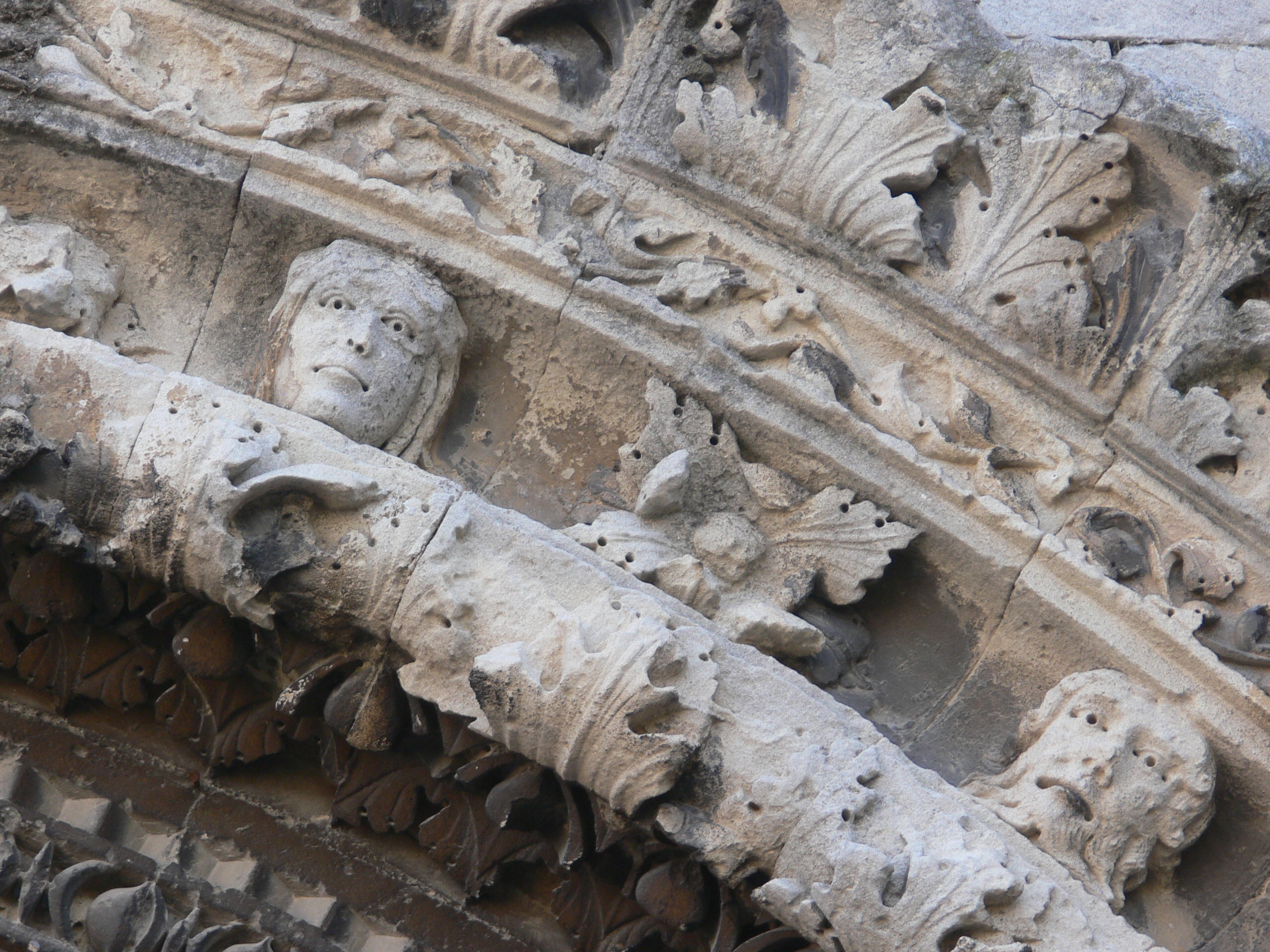 Saint-Paul-Trois-Châteaux - cathédrale - détail du portail